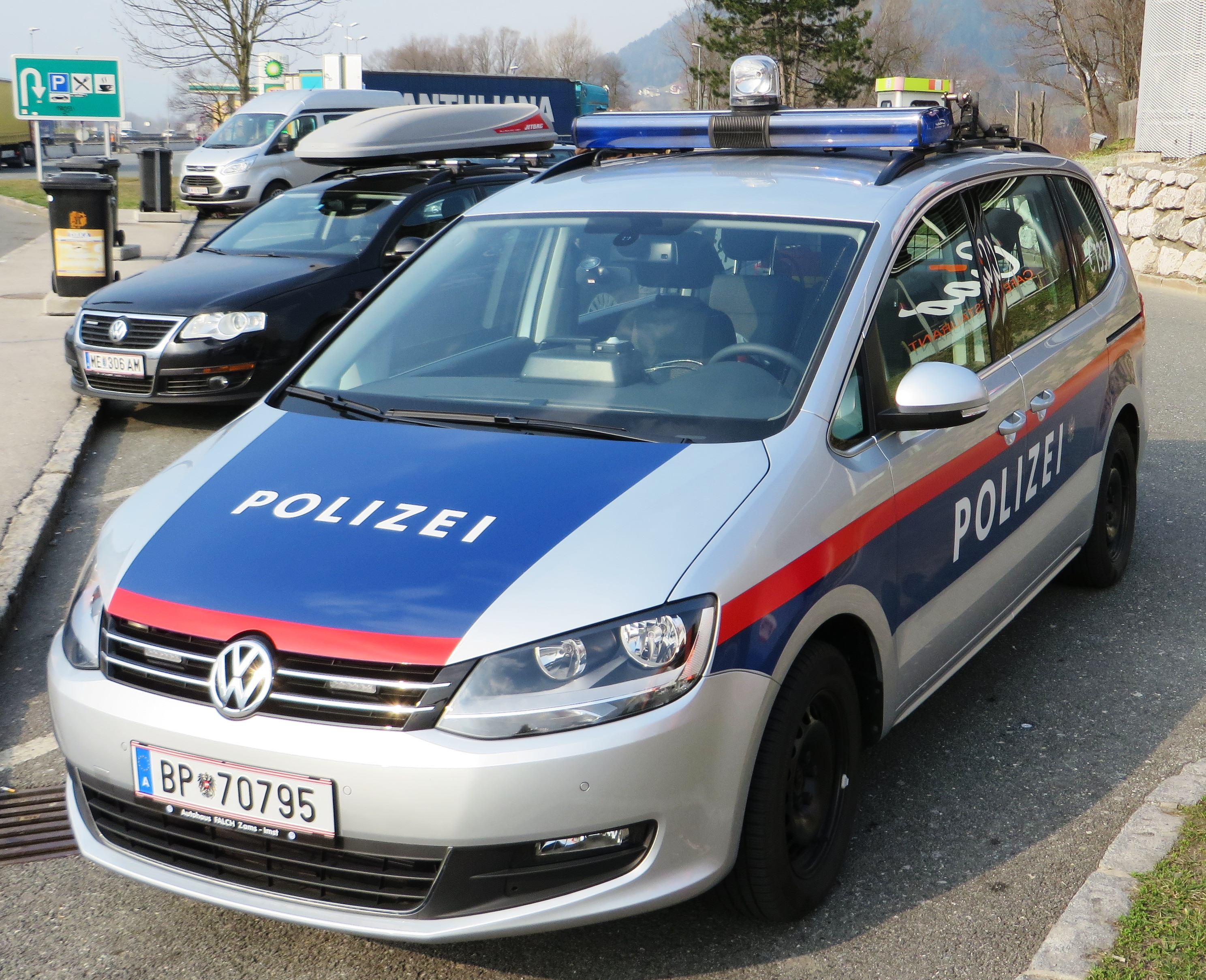 politieauto Oostenrijk